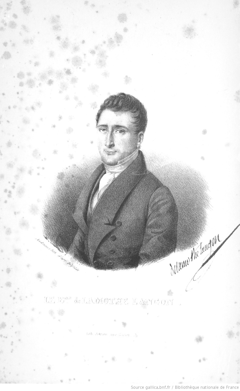 Étienne de Lamothe-Langon (1786-1864)